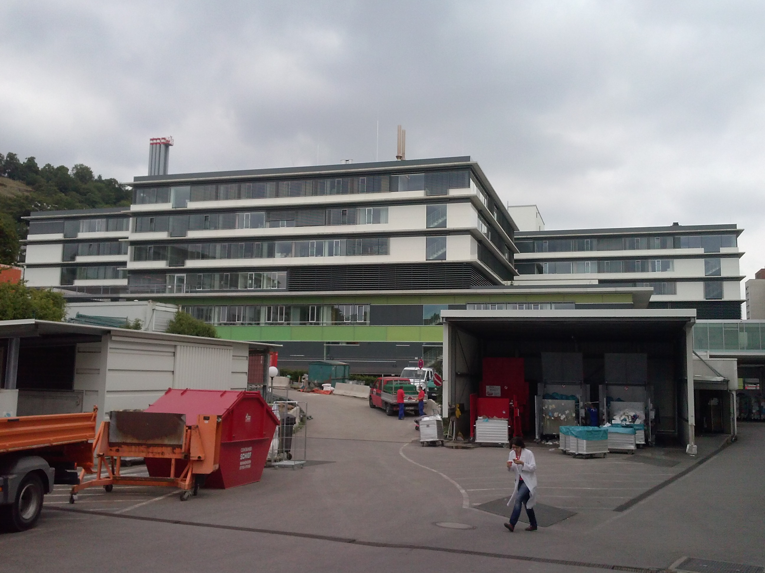 Olgahospital und Frauenklinik Stuttgart